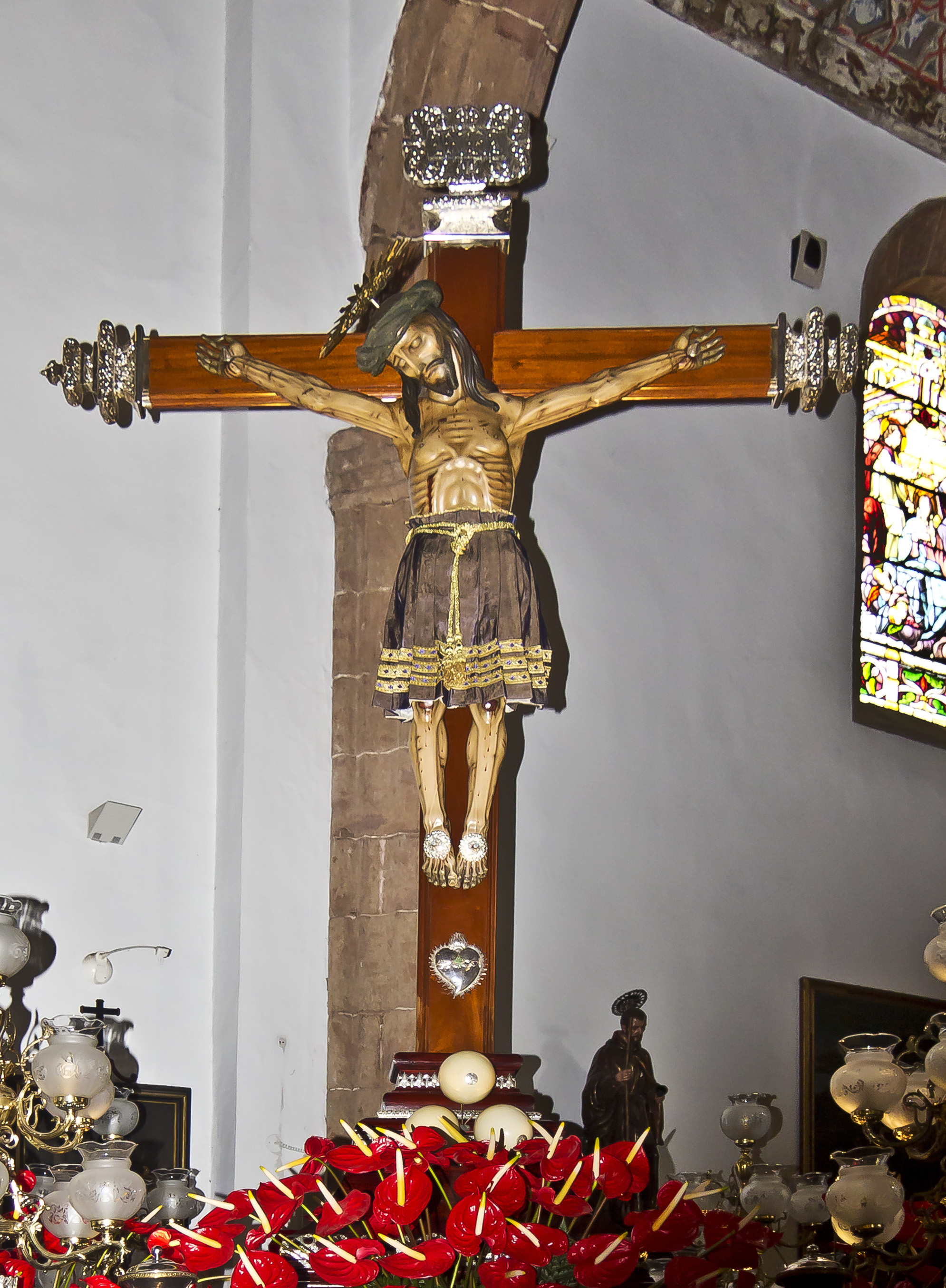 Paso del Santísimo Cristo de Burgos („Cristo de la faldita“) 2013 en la Iglesia Concepción